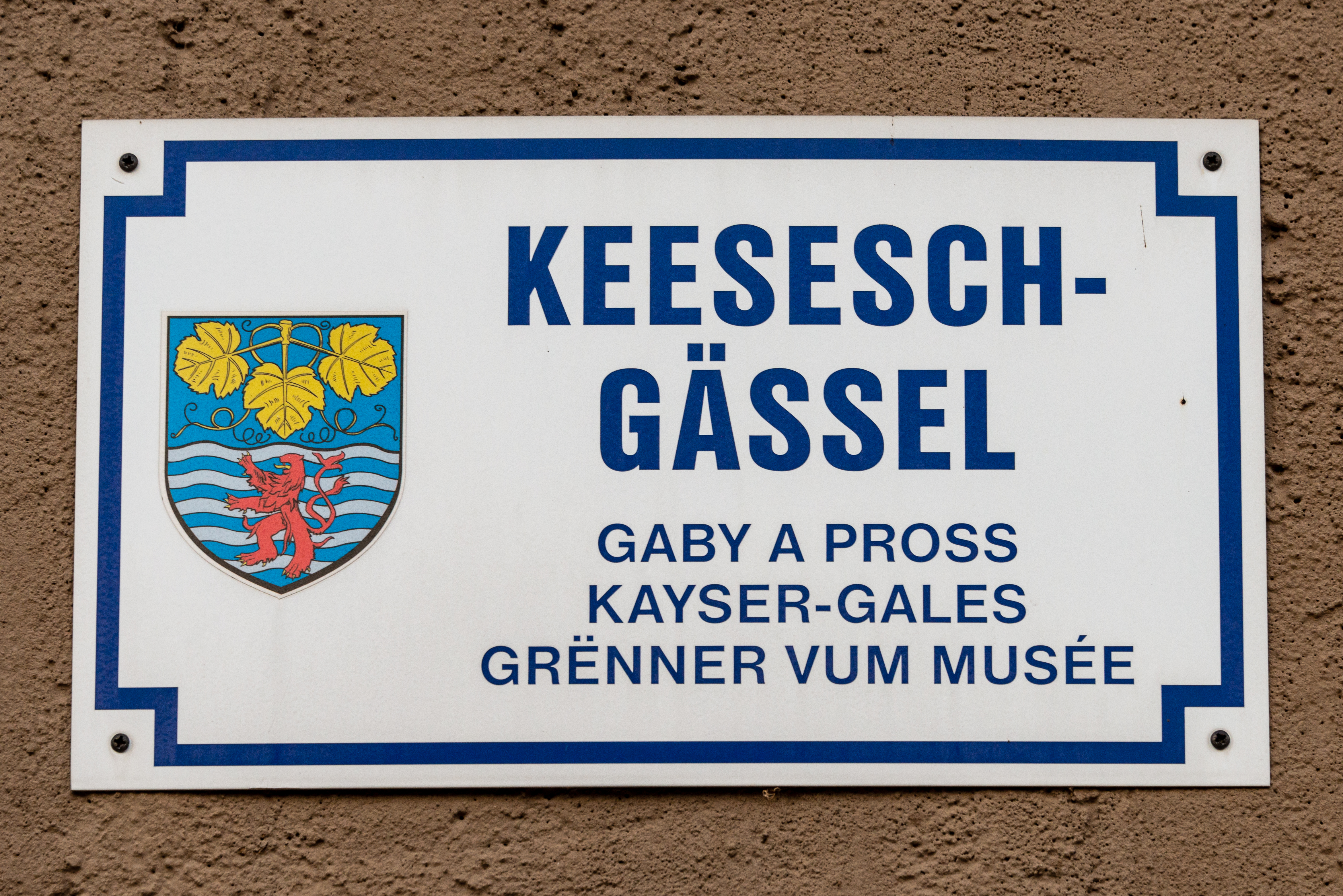 Stroosseschëld um Possenhaus zu Bech-Maacher.